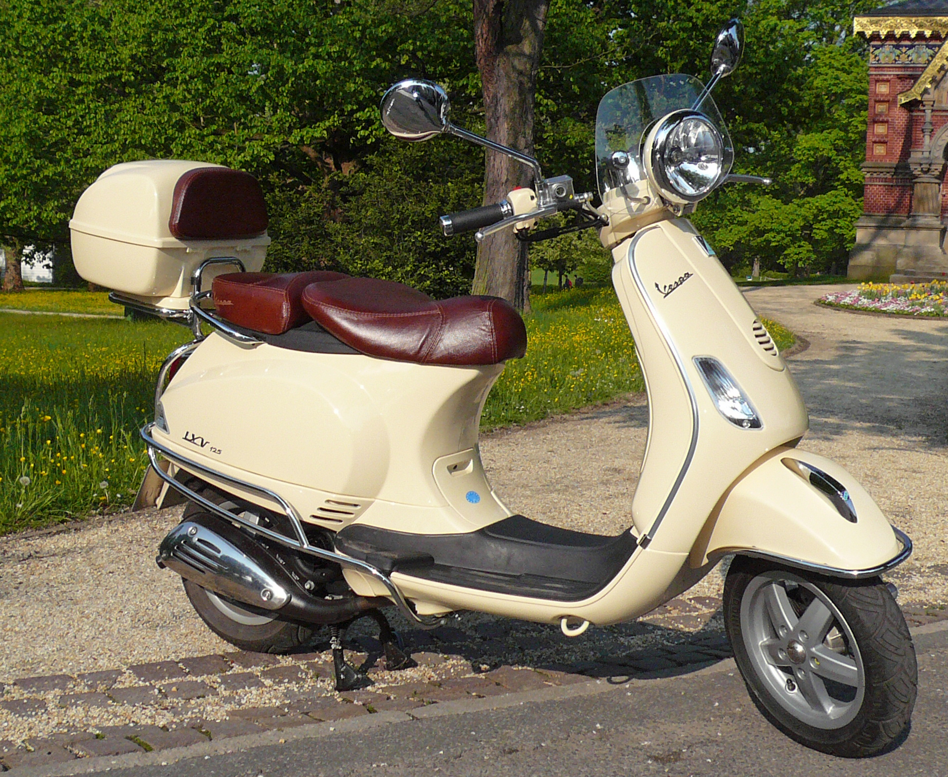 Vespa LXV 125 mit Fußmatte, Topcase und Sturzbügel als Sonderzubehör